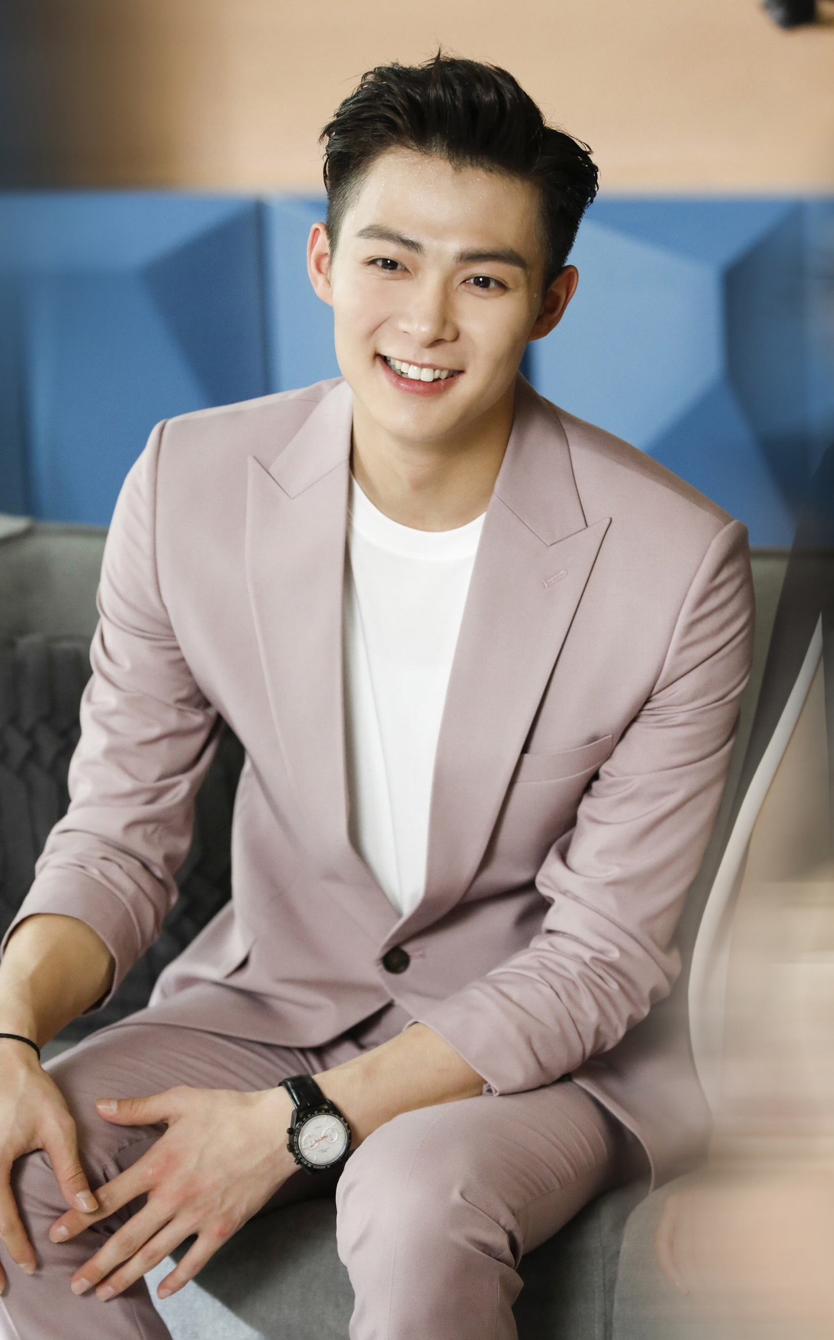 180806 探班群访 风尘仆仆地来 陪你看了看夏日里的一场雨 满足 (张铭恩)